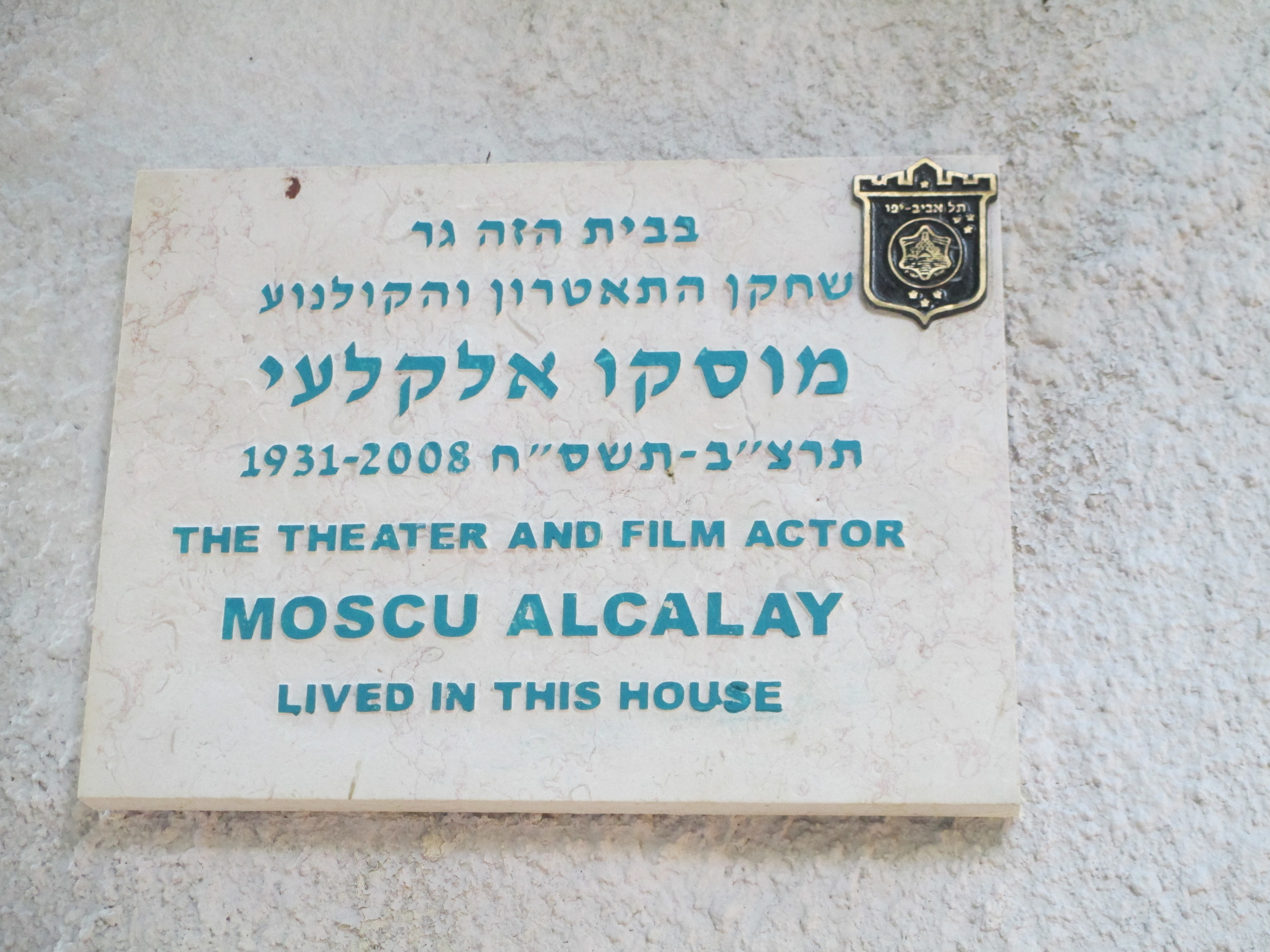 לוחית זיכרון למוסקו אלקלעי בכניסה לביתו ברחוב דיזנגוף 23 בתל אביב